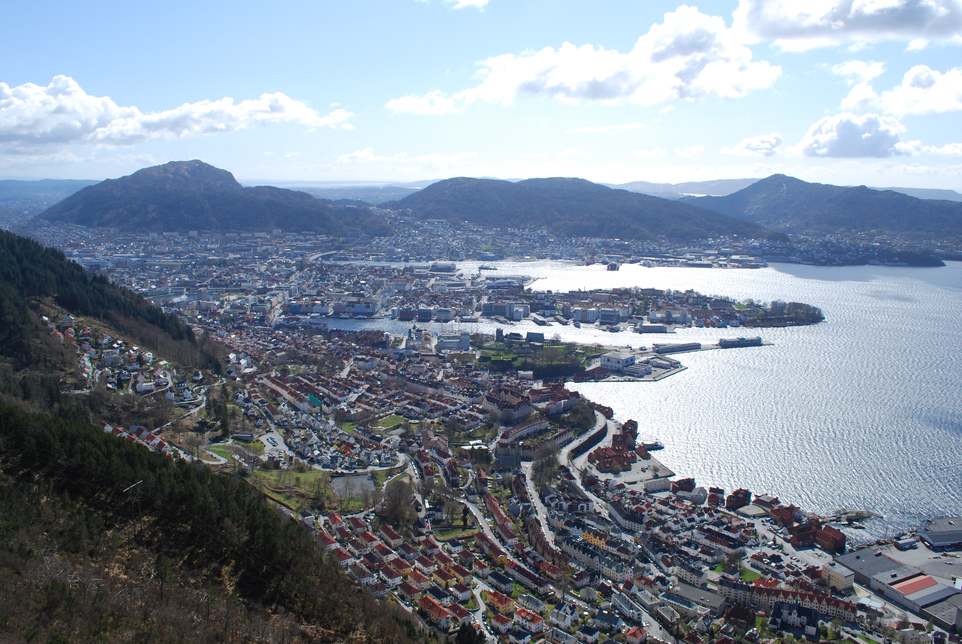 Utsikt fra Sandviksfjelletmot Bergen med Løvstakken, Damsgårdsfjellet og Lyderhorn i bakgrunnen